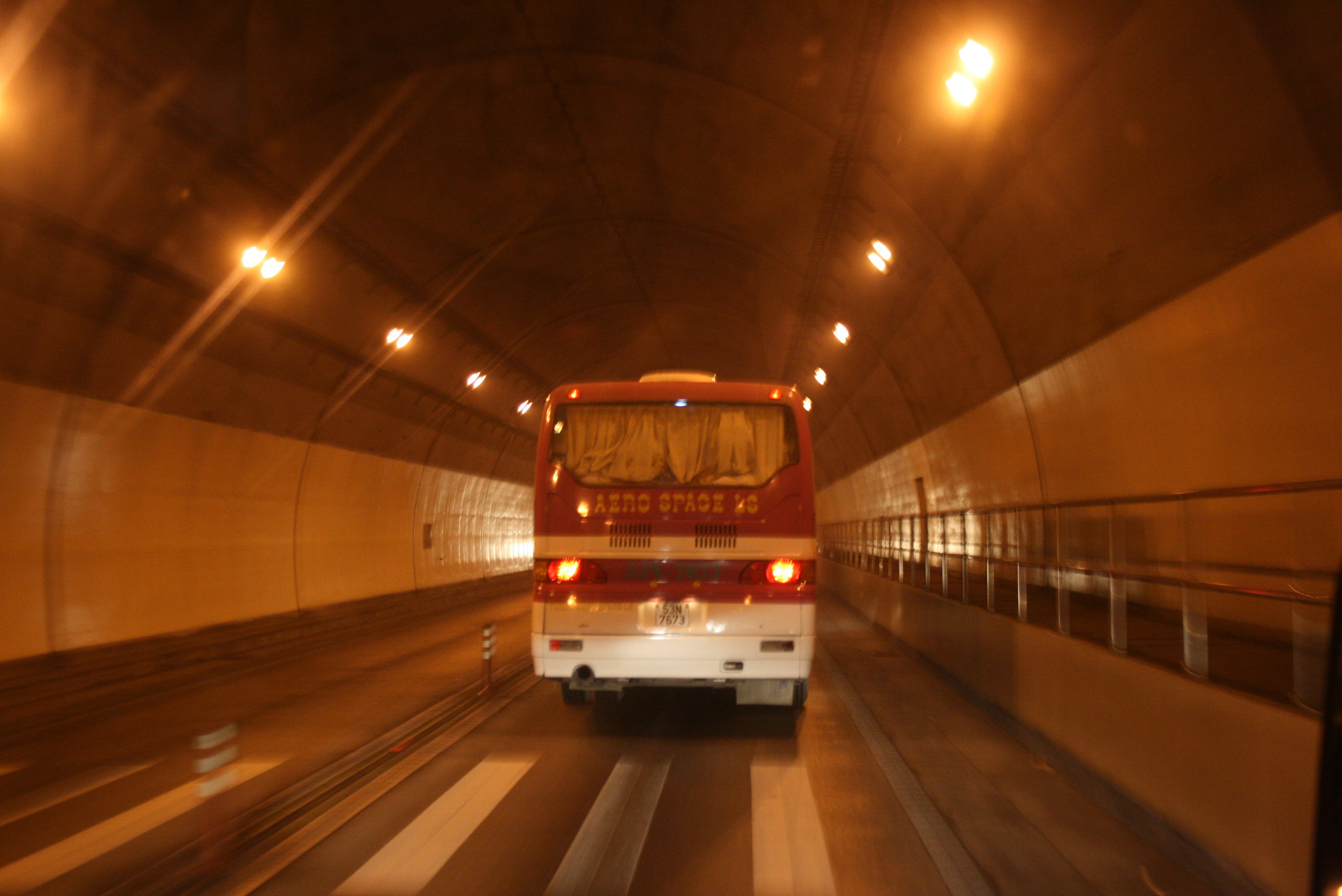 Hình chụp bên trong hầm Hải Vân, Việt Nam. Ảnh chụp bởi: Lưu Ly Ngày: 14:45, ngày 7 tháng 1 năm 2008 (UTC)